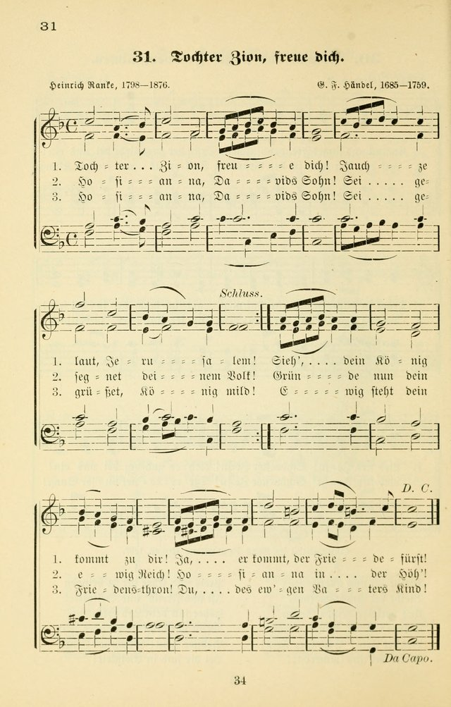 Tochter Zion, freue dich (aus: Liederkranz für Sonntags-Schulen und Jugend-Vereine, St. Louis 1898)